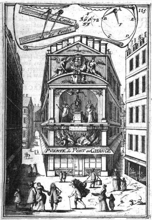 "Pointe du Pont au Change" (Vue fantaisiste).